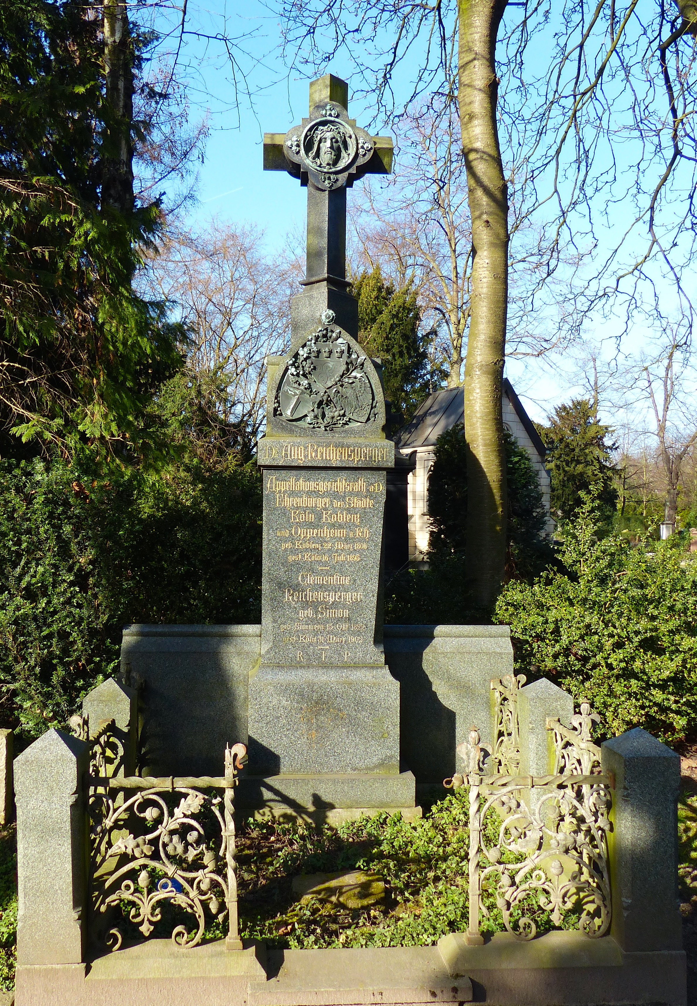 Grabstelle auf dem Melaten-Friedhof: August Reichensperger (* 22. März 1808 in Koblenz; † 16. Juli 1895 in Köln) war deutscher Jurist und Politiker sowie Förderer des Kölner Doms.